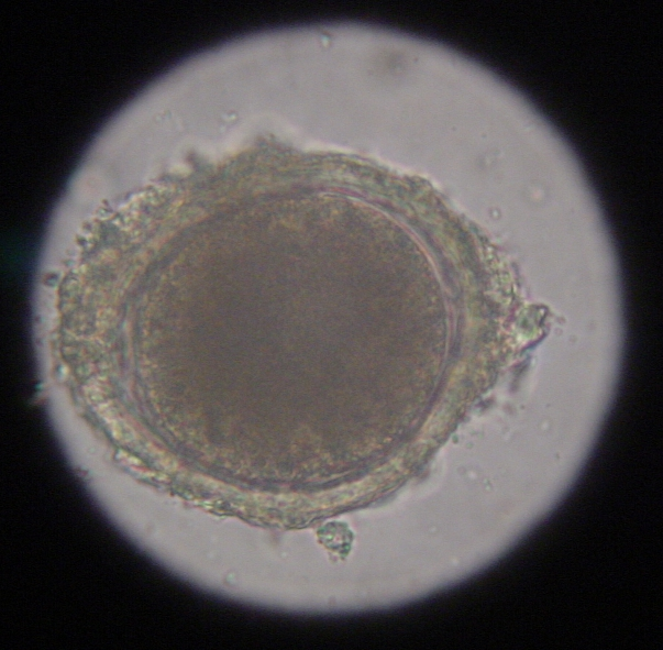 Spulwurmei, mikroskopisch dargestellt